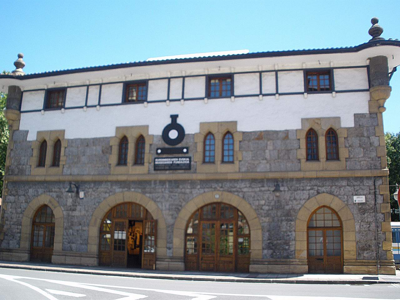 Museo Vasco del Ferrocarril, en la antigua estación de tren de Azpeitia (Gipuzkoa)